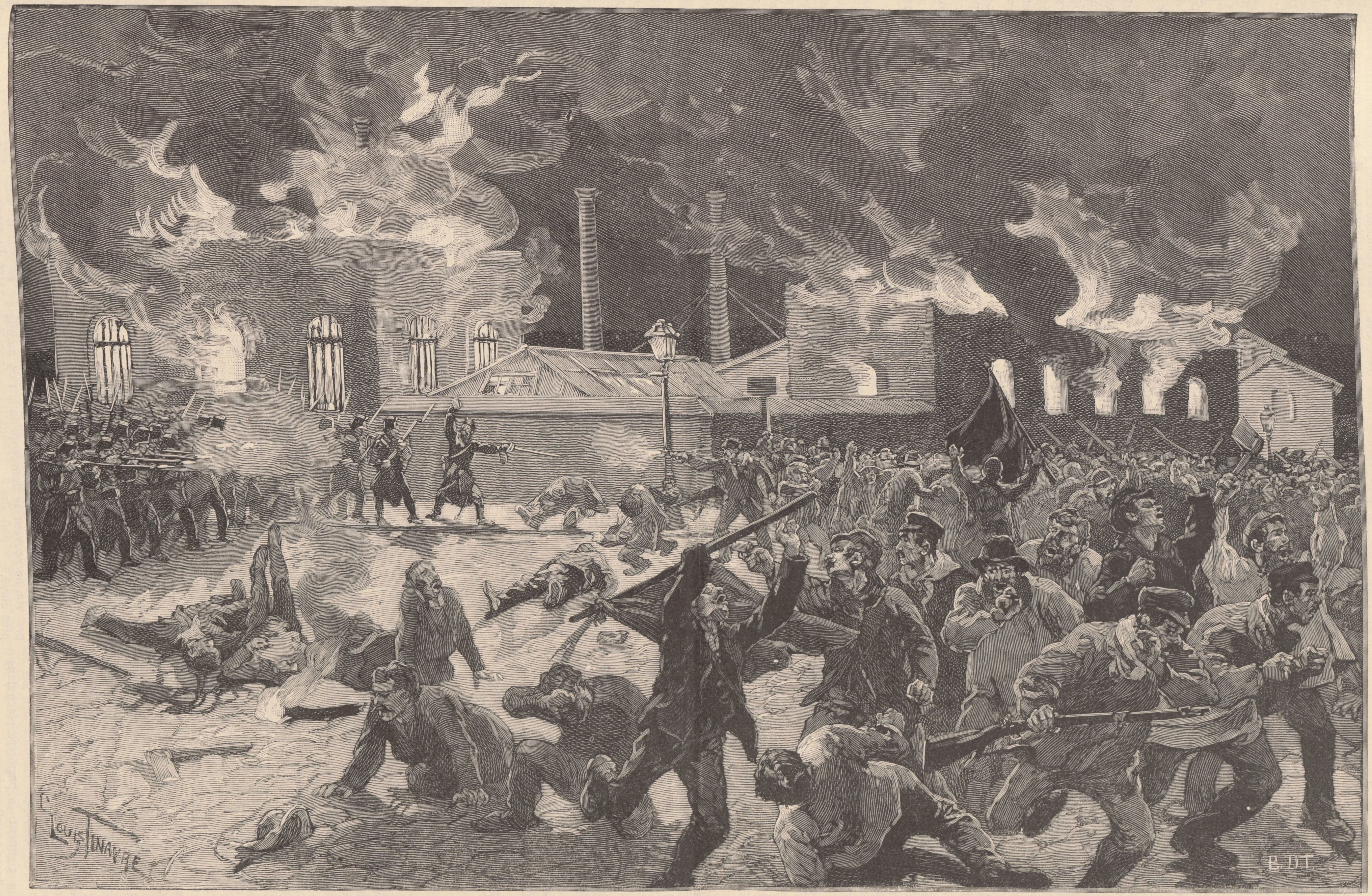 Roux - Les chasseurs du 3e régiment, sous les ordres du capitaine Bulot, dispersent par la force les émeutiers qui viennent d'incendier la Verrerie du Hainaut. (Dessin de M. Tinayre, d'après le croquis de M. Dick).